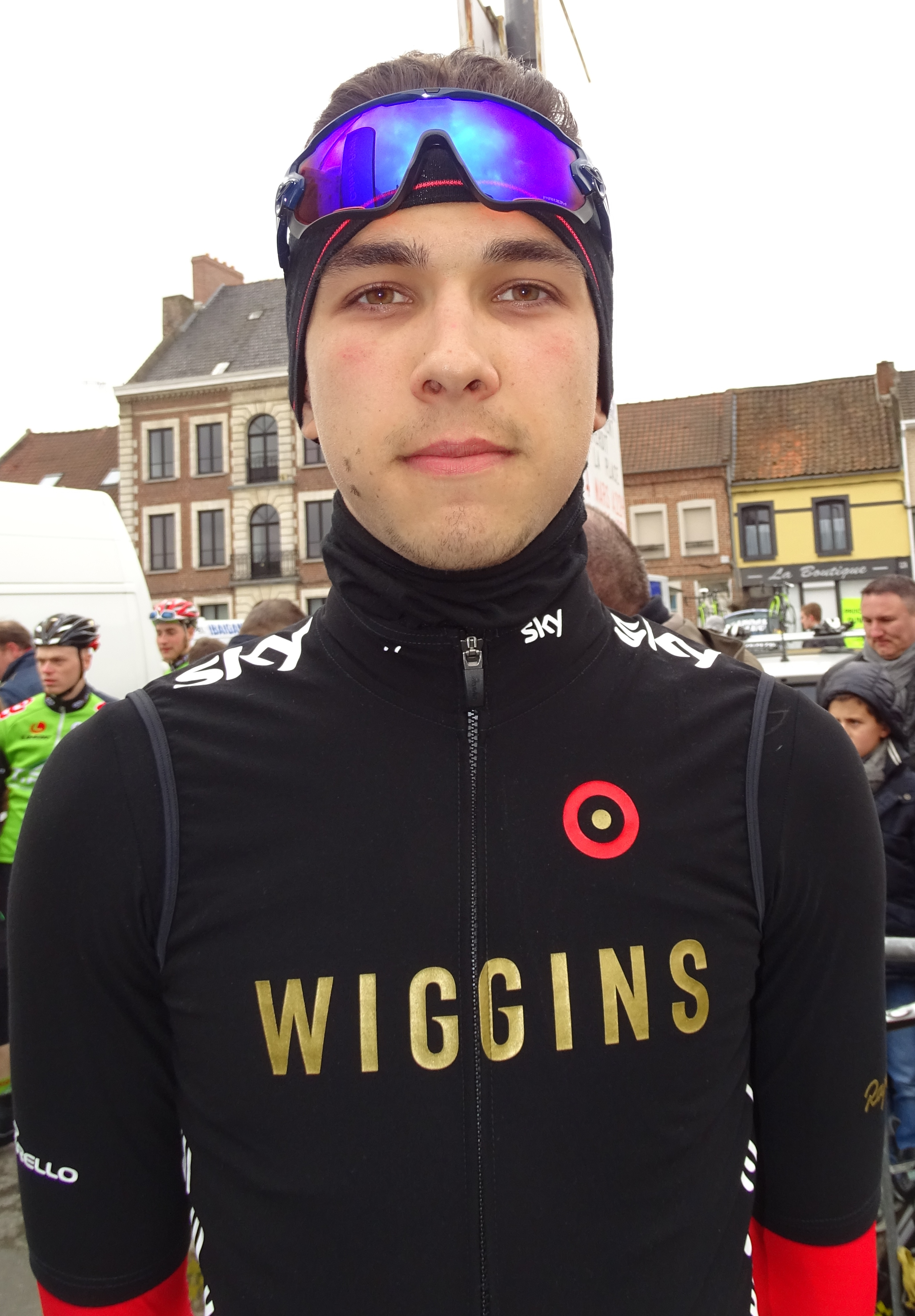 Reportage réalisé le dimanche 6 mars à l'occasion du départ et de l'arrivée du Grand Prix de Lillers-Souvenir Bruno Comini 2016 à Lillers, Pas-de-Calais, Nord-Pas-de-Calais, France.